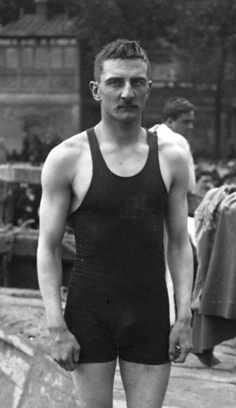 Theuriet, sergent au 103e d'infanterie [natation, bassin de l'Hôtel de Ville, à Paris, le 31 juillet 1910] : [photographie de presse] / [Agence Rol]